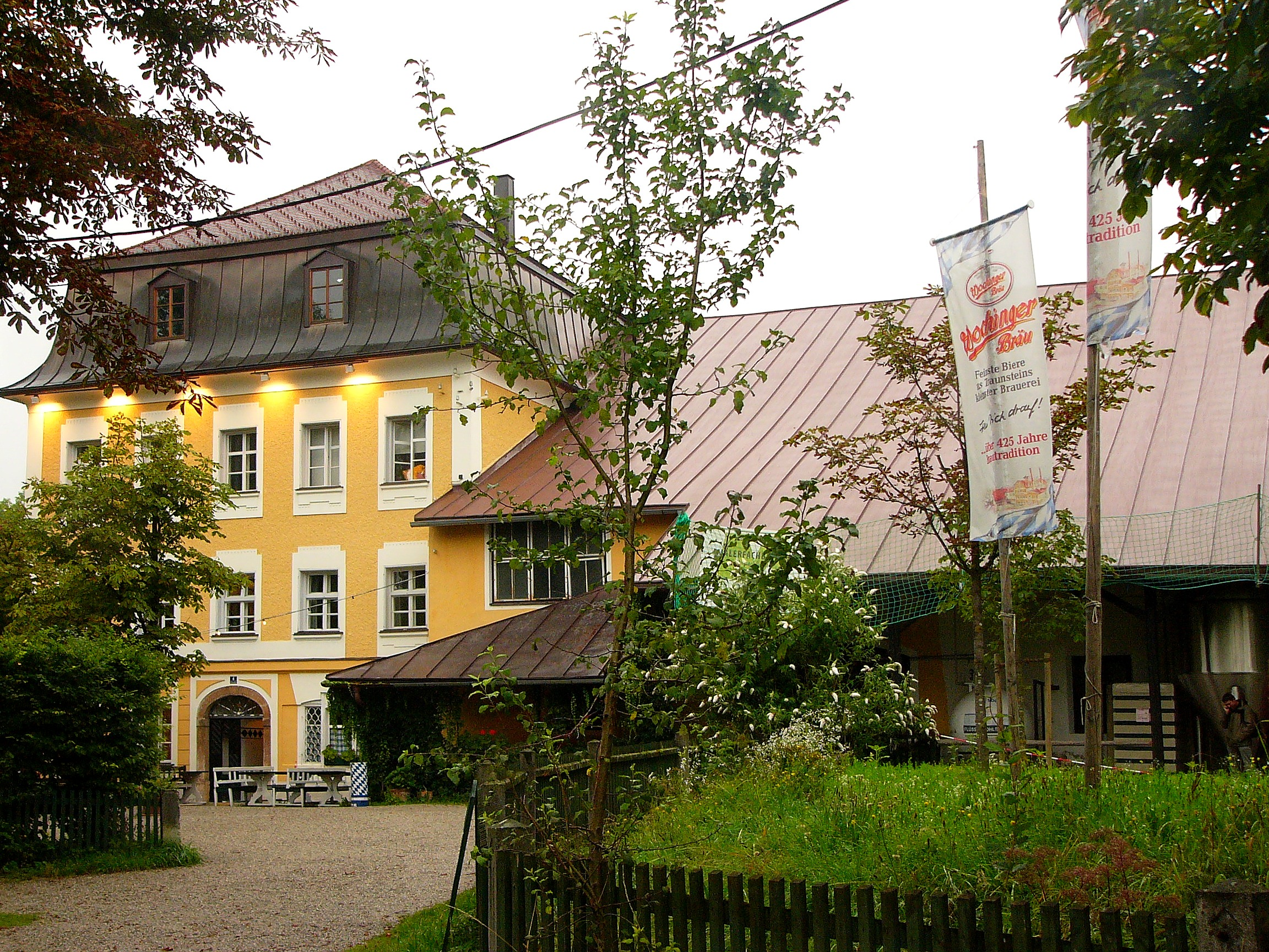 Wochinger-Keller; stattlicher Brauereikomplex; Gasthaus, dreigeschossiger Mansarddachbau mit klassizistischer Putzgliederung, am Portal bezeichnet mit dem Jahr 1803 und 1807, angefügter erdgeschossiger Stalltrakt und große Nebengebäude; mehrteilige, gewölbte Bierkelleranlage, etwa 8 m unter Fußbodenniveau; zugehörig Sudund Maschinenhaus, hoher Putzbau mit Mansarddach, 1901. This is a photograph of an architectural monument.